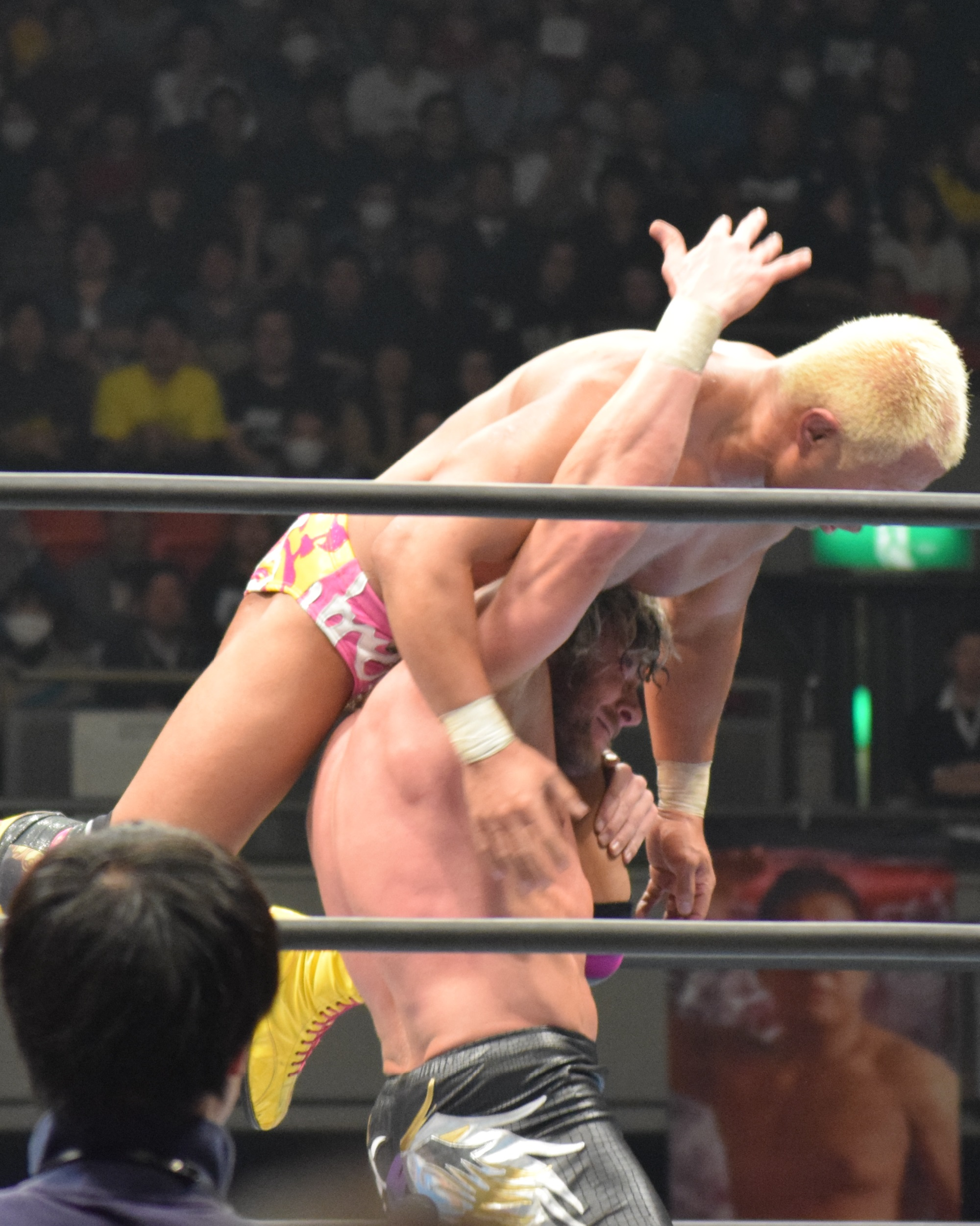 2016年2月11日 大阪府立体育会館 「THE NEW BEGINNING in OSAKA」 本間朋晃に片翼の天使を決めようとするケニー・オメガ